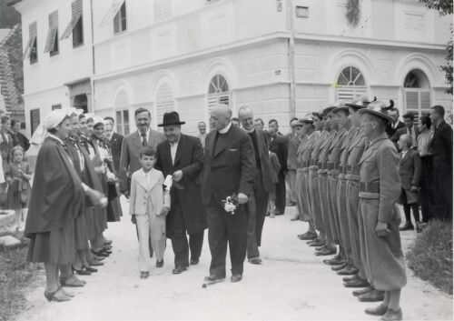 Anton Korošec na proslavi 20-letnice Jugoslavije v Šoštanju